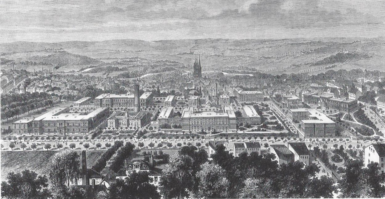 Klinik- und Institutskomplex der Universität Halle (1876–1884) an der Magdeburger Straße, nach dem Entwurf von Ludwig von Tiedemann